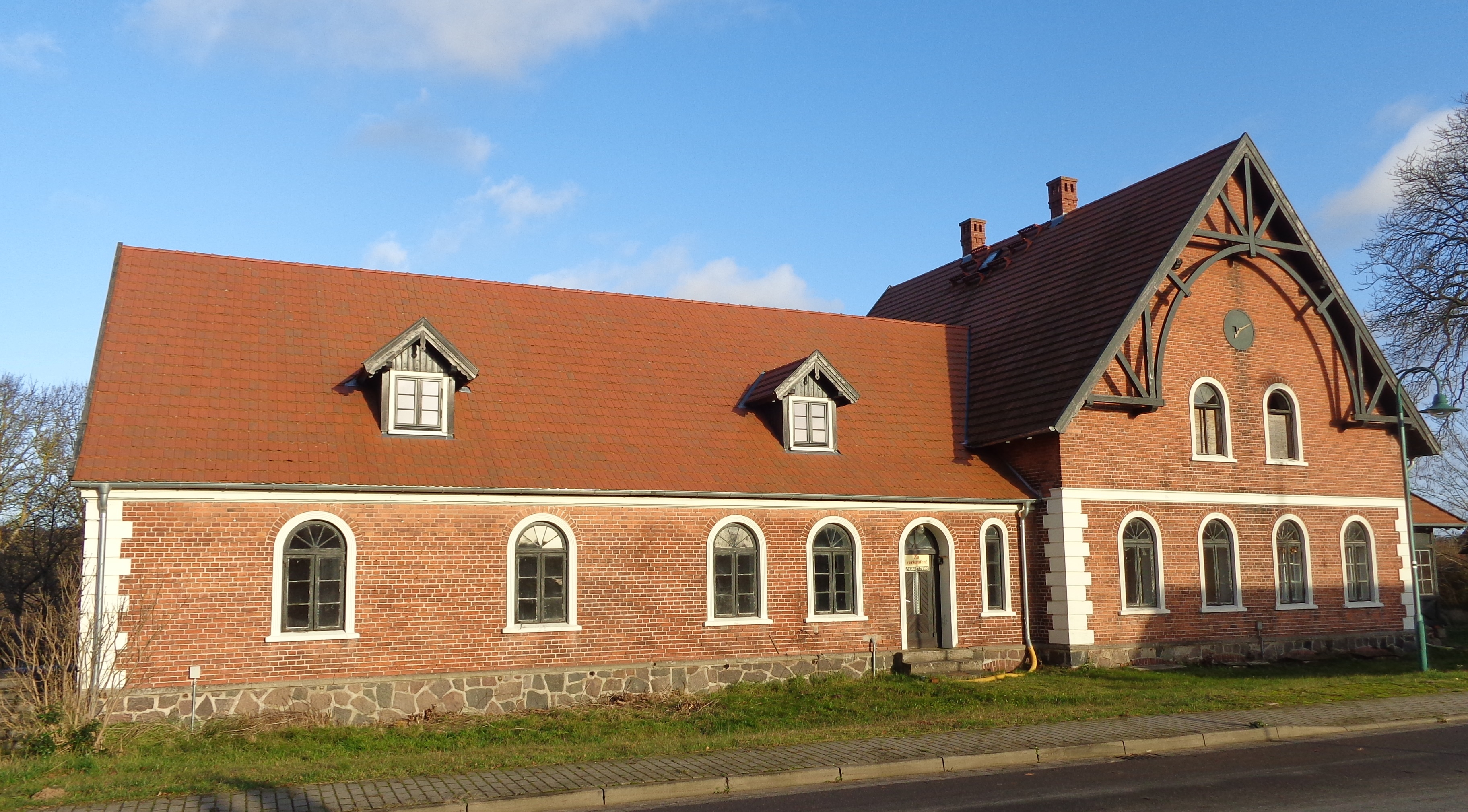 Ehemaliges Inspektorenhaus von Schloss Dobbin.